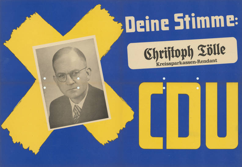 Deine Stimme Christoph Tölle Kreissparkassen-Rendant CDU Abbildung: Porträtfoto - Stimmkreuz Plakatart: Kandidaten-/Personenplakat mit Porträt Objekt-Signatur: 10-009 : 180 Bestand: Landtagswahlplakate Nordrhein-Westfalen (10-009) GliederungBestand10-18: Landtagswahlplakate Nordrhein-Westfalen (10-009) » Landtagswahl am 18.6.1950 » CDU » mit Porträtfoto Lizenz: KAS/ACDP 10-009 : 180 CC-BY-SA 3.0 DE